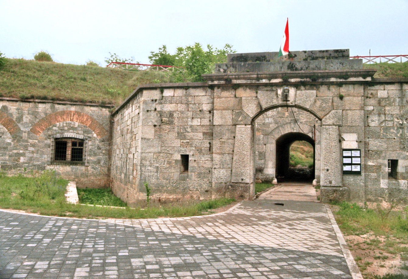 Komárom, Ungarn: Zugang zum Fort Igmánd.